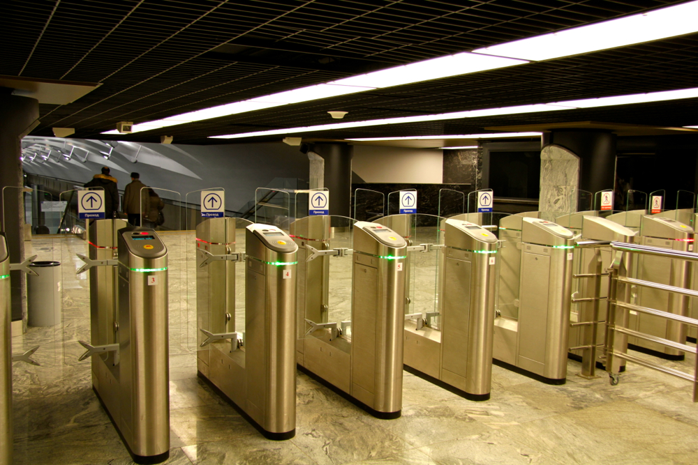 Lyublinsko-Dmitrovskaya Line (Люблинско-Дмитровская линия) Moscow Metro (Московский метрополитен) The movie about Borisovo, Shipilovskaya and Zyablikovo stations (Фильм о станциях Борисово, Шипиловская и Зябликово)